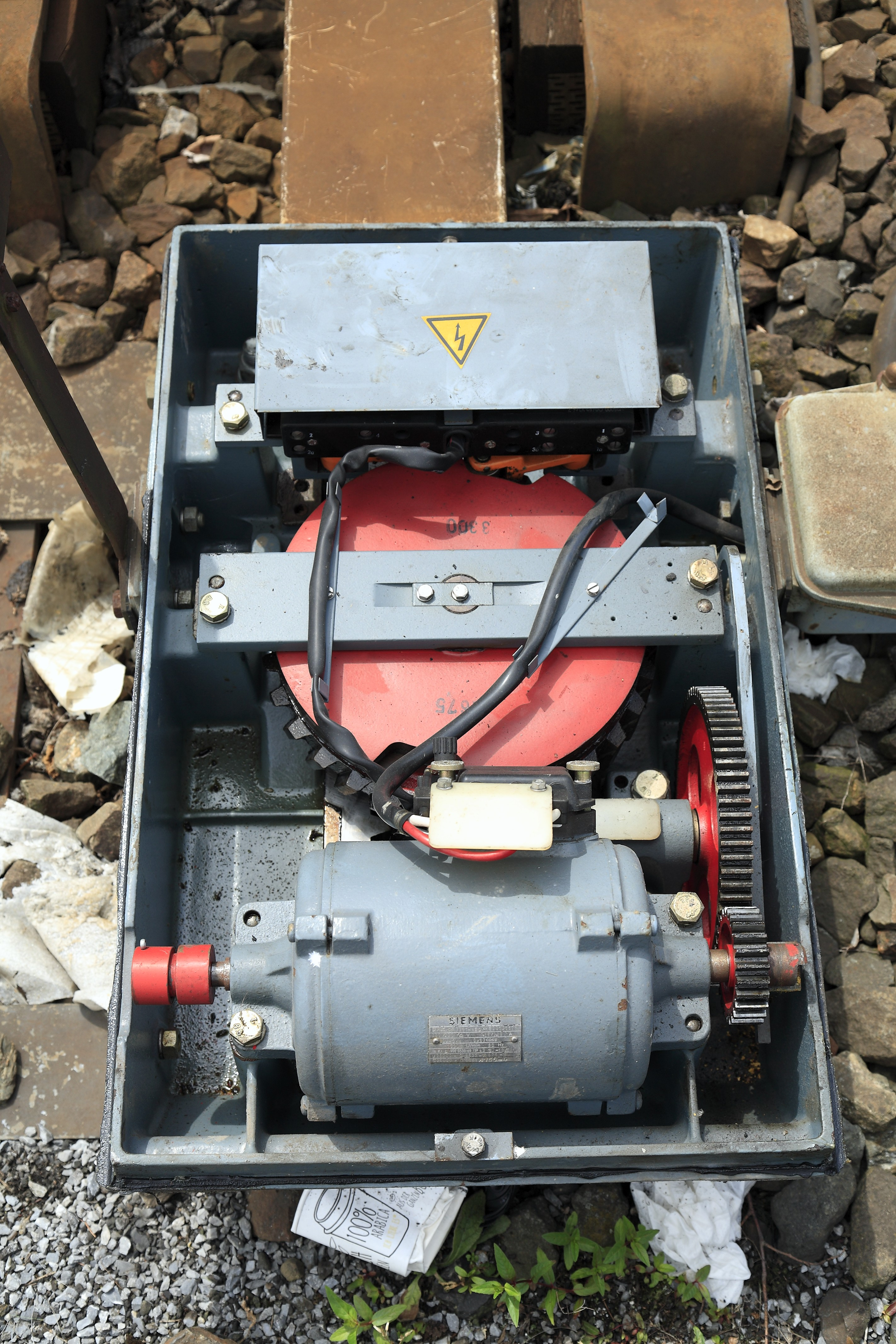 Schnellläuferweichenantrieb für Ablaufweichen mit auf 0,6 bis 0,8 Sekunden verkürzter Umstellzeit. Der Drehwinkel des Getriebeblocks ist von 270 auf 180 Grad verringert, damit reduzieren sich auch die Überdeckung des Weichenverschlusses und der Zungenaufschlag. Zusätzlich hat das Vorgelege zwischen Motor und Getriebeblock eine deutlich geringere Übersetzung.